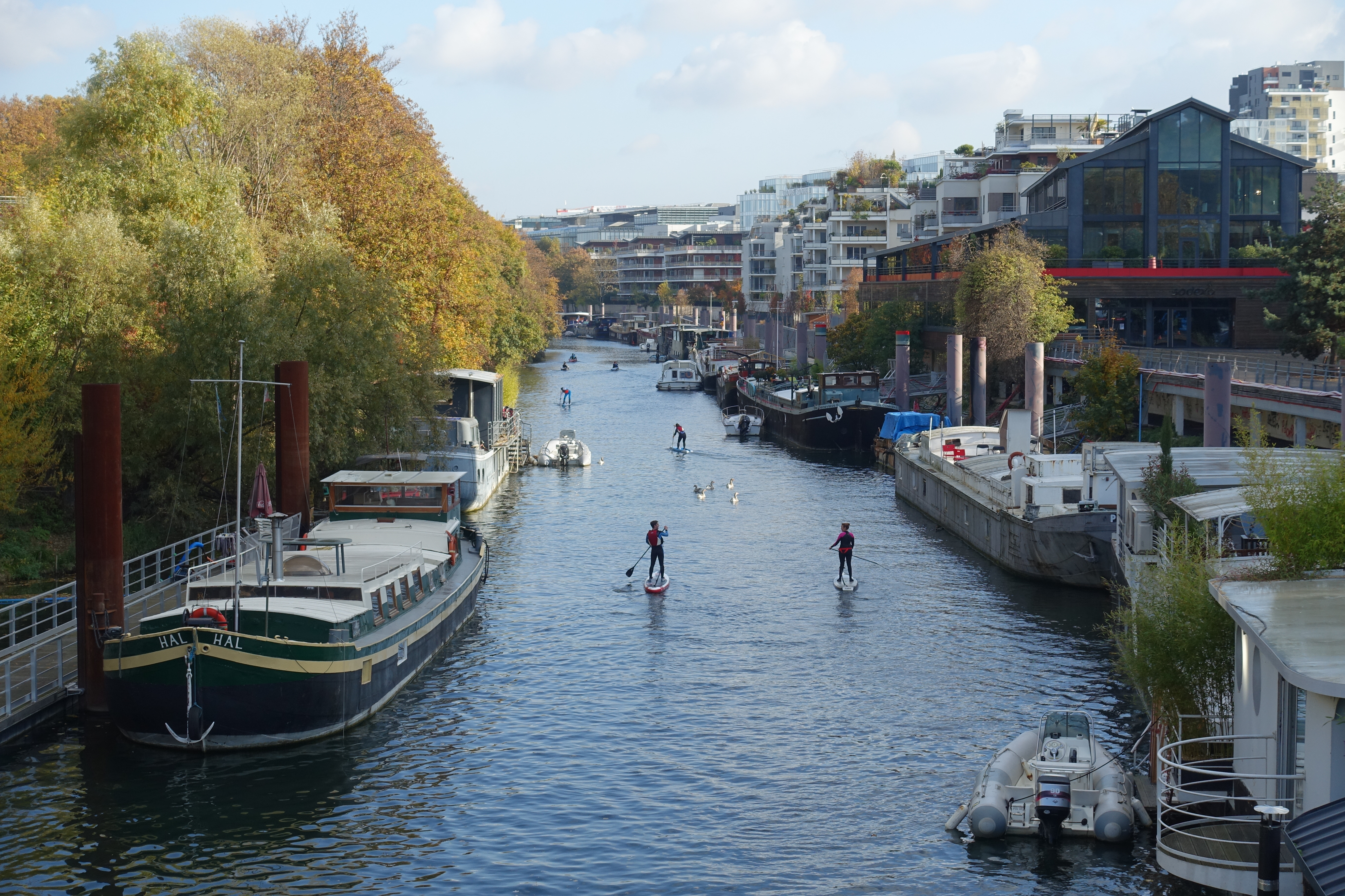 Petit Bras de Seine @ Issy-les-Moulineaux @ Paris